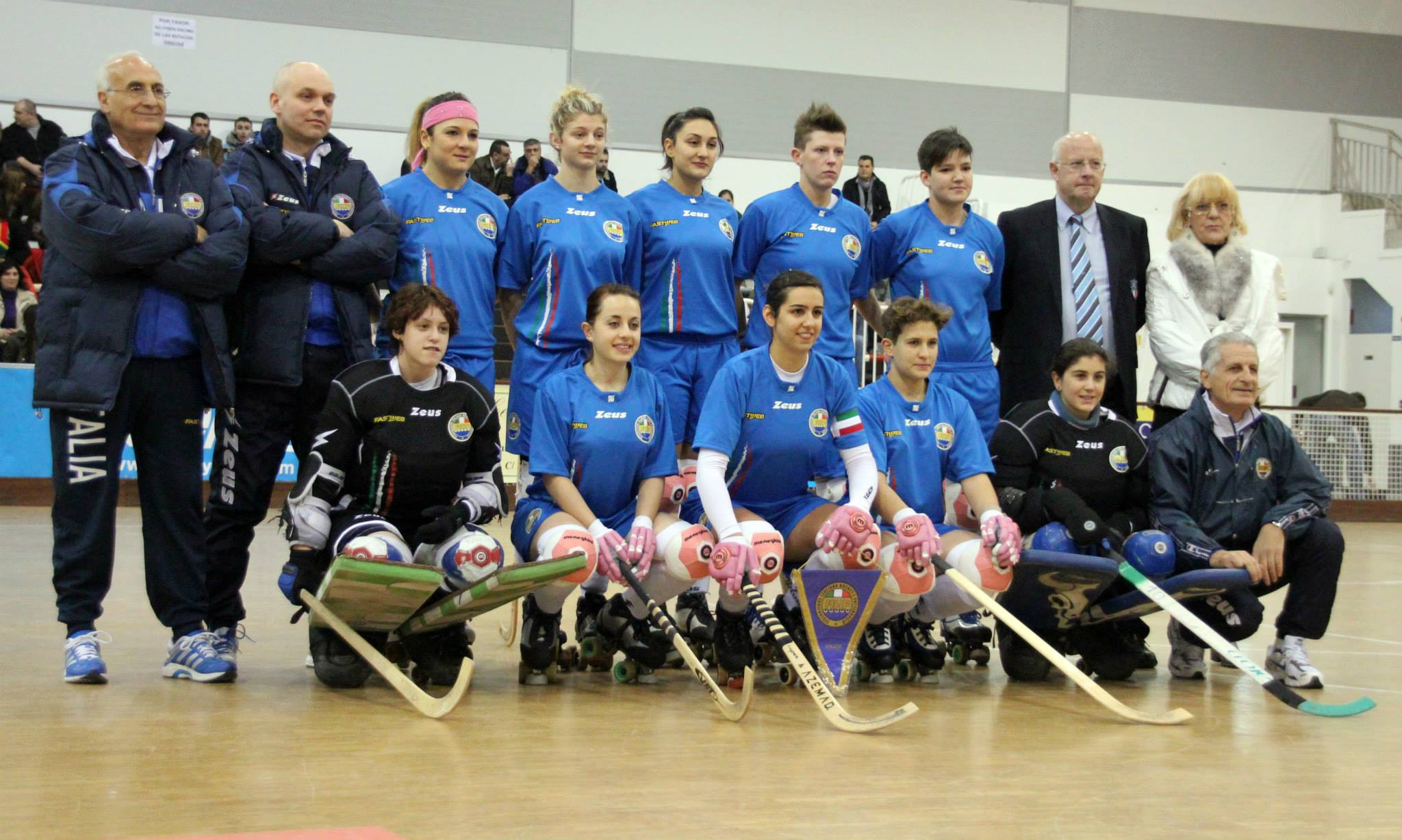 Le Azzurre posano per la foto di squadra all'Europeo di Mieres 2013